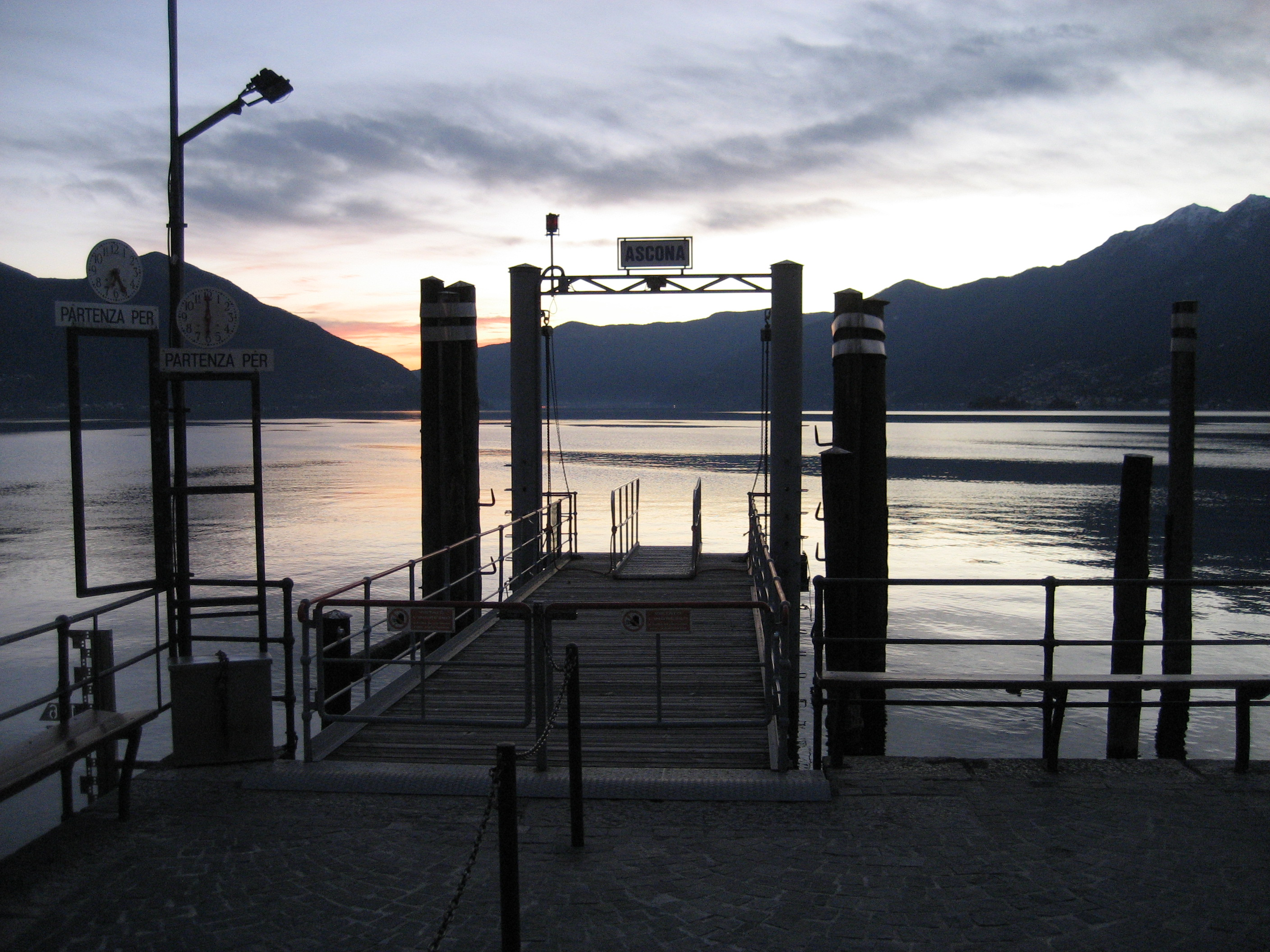 Schiffländte Ascona